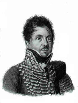 Général_Francois_Fournier_Sarlovese